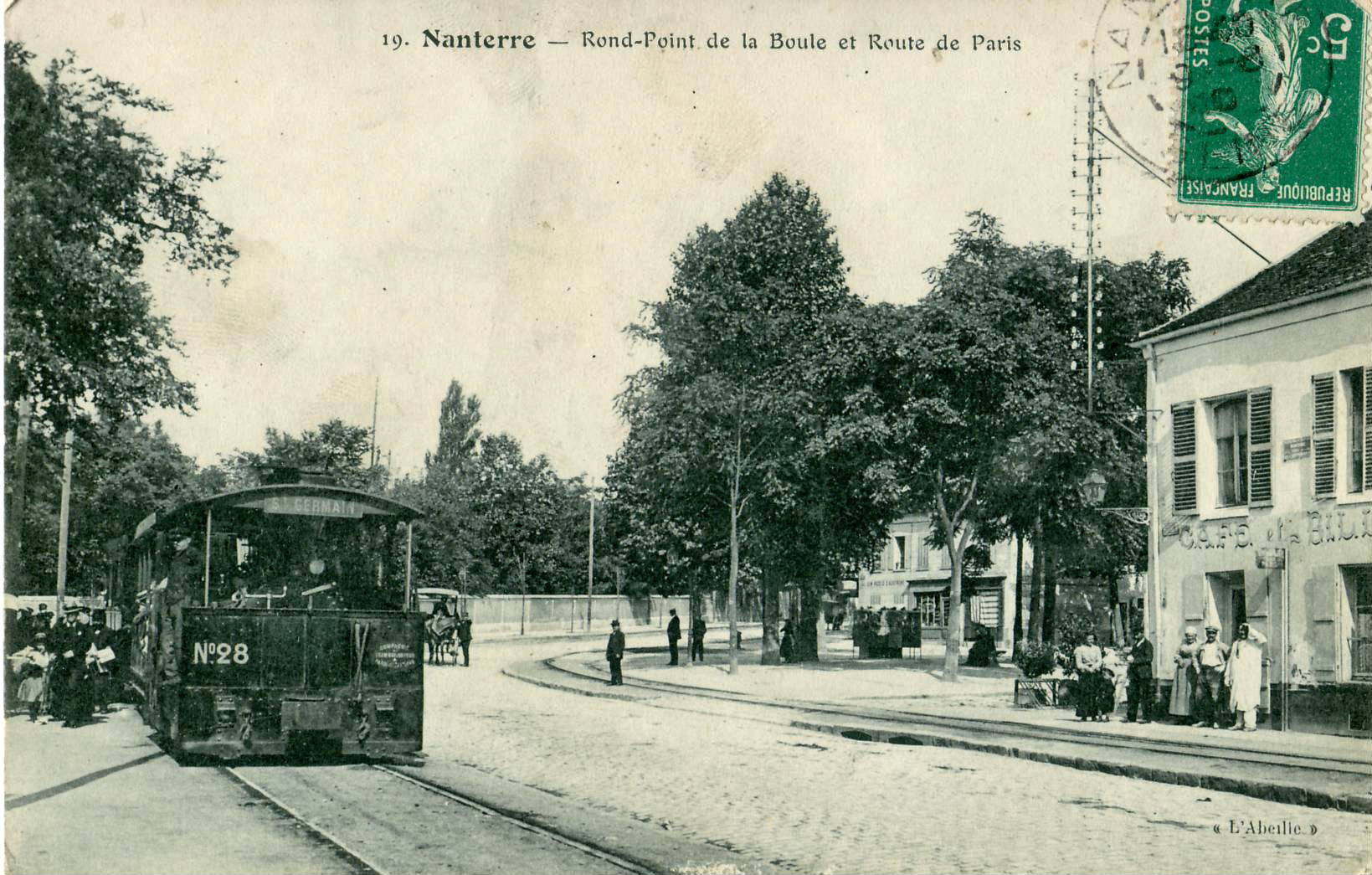 Carte postale ancienne éditée par Abeille, N°19Nanterre : Rond-point de la Boule et Route de ParisVue d'une locomotive à vapeur "Blanc-Misseron" du Tramway Paris - Saint-Germain (le reste de la rame est cachée par la courbe